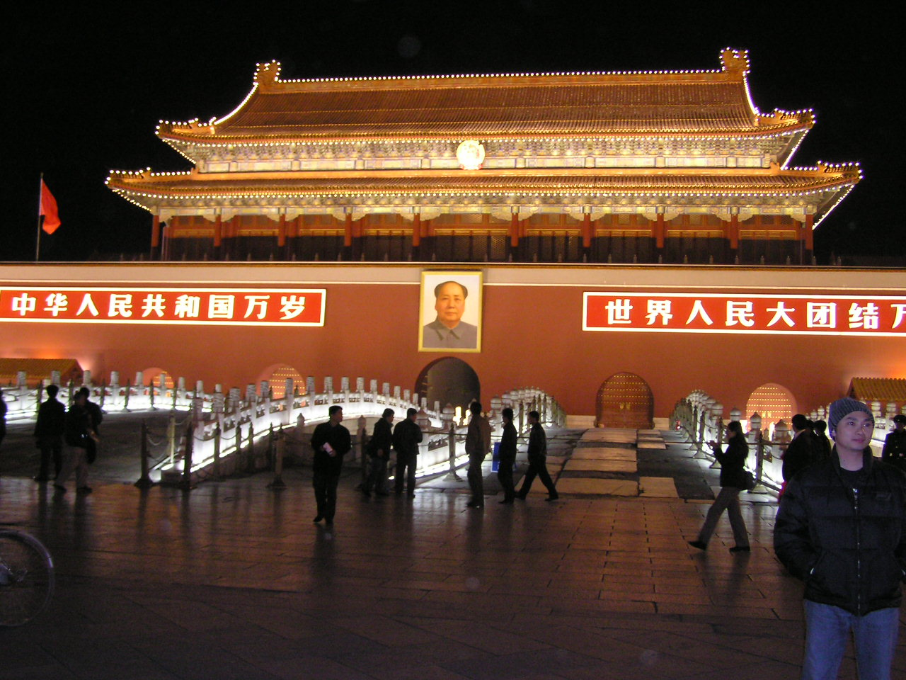 Изглед към Портата на Небесното спокойствие от площад Тиенанмън.